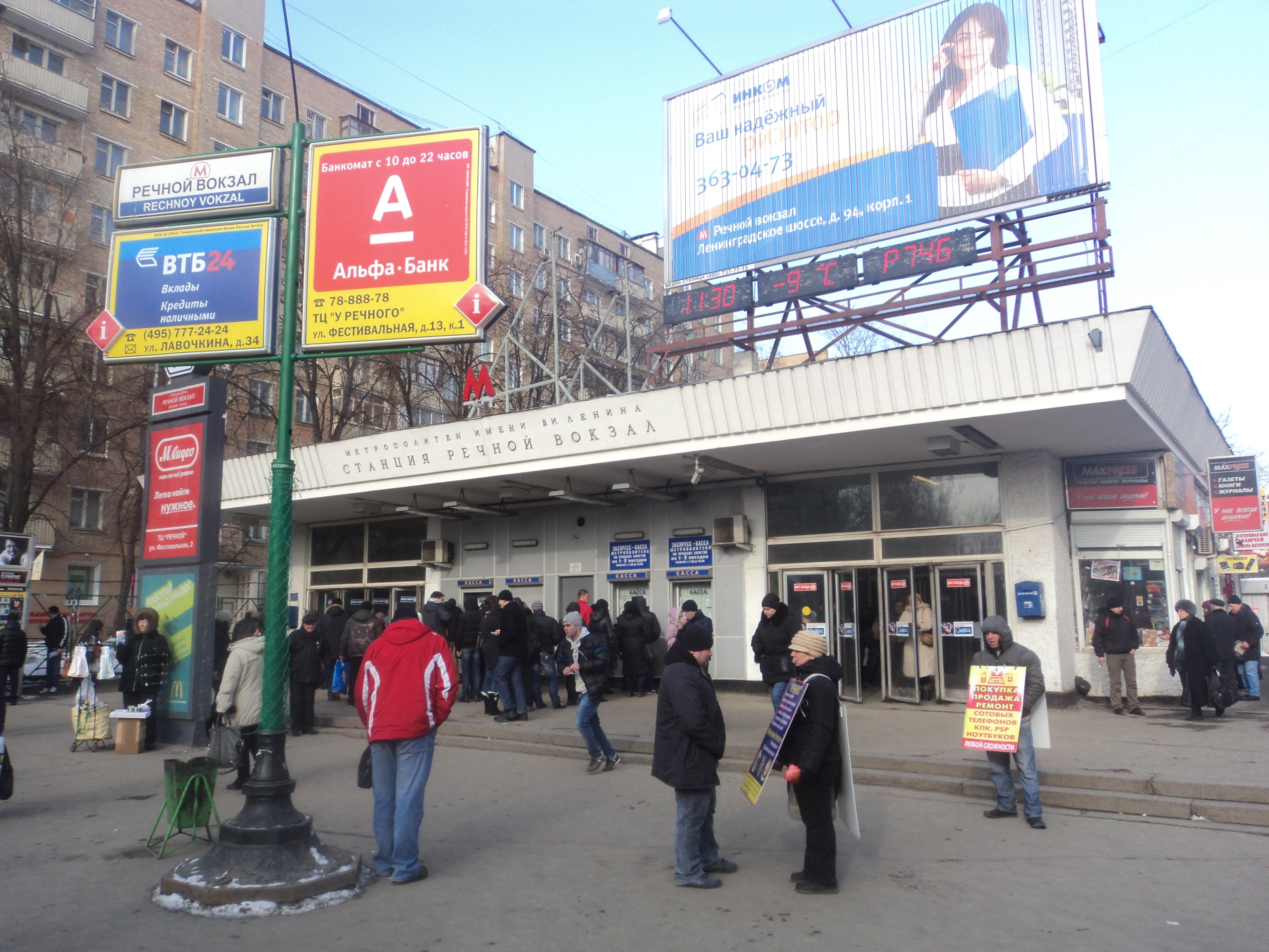 Северный вестибюль станции метро "Речной вокзал"